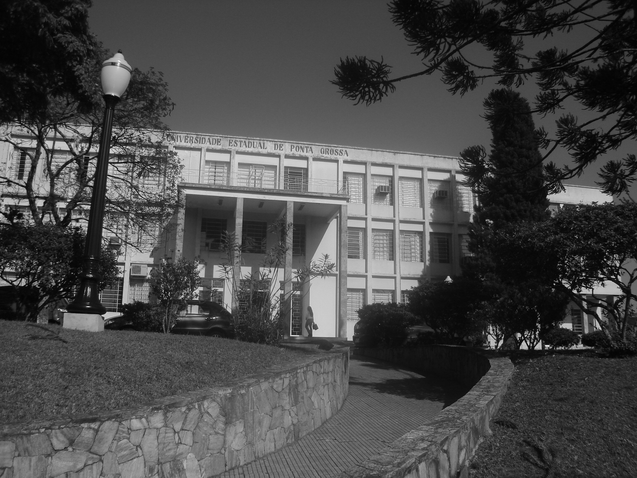 Fachada do campus central da Universidade Estadual de Ponta Grossa (UEPG), em Ponta Grossa, Paraná, Brasil.